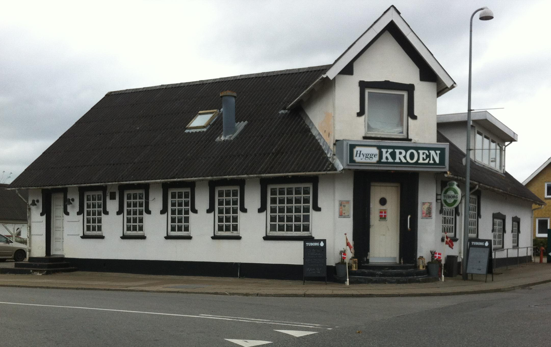 Hyggekroen i Kås